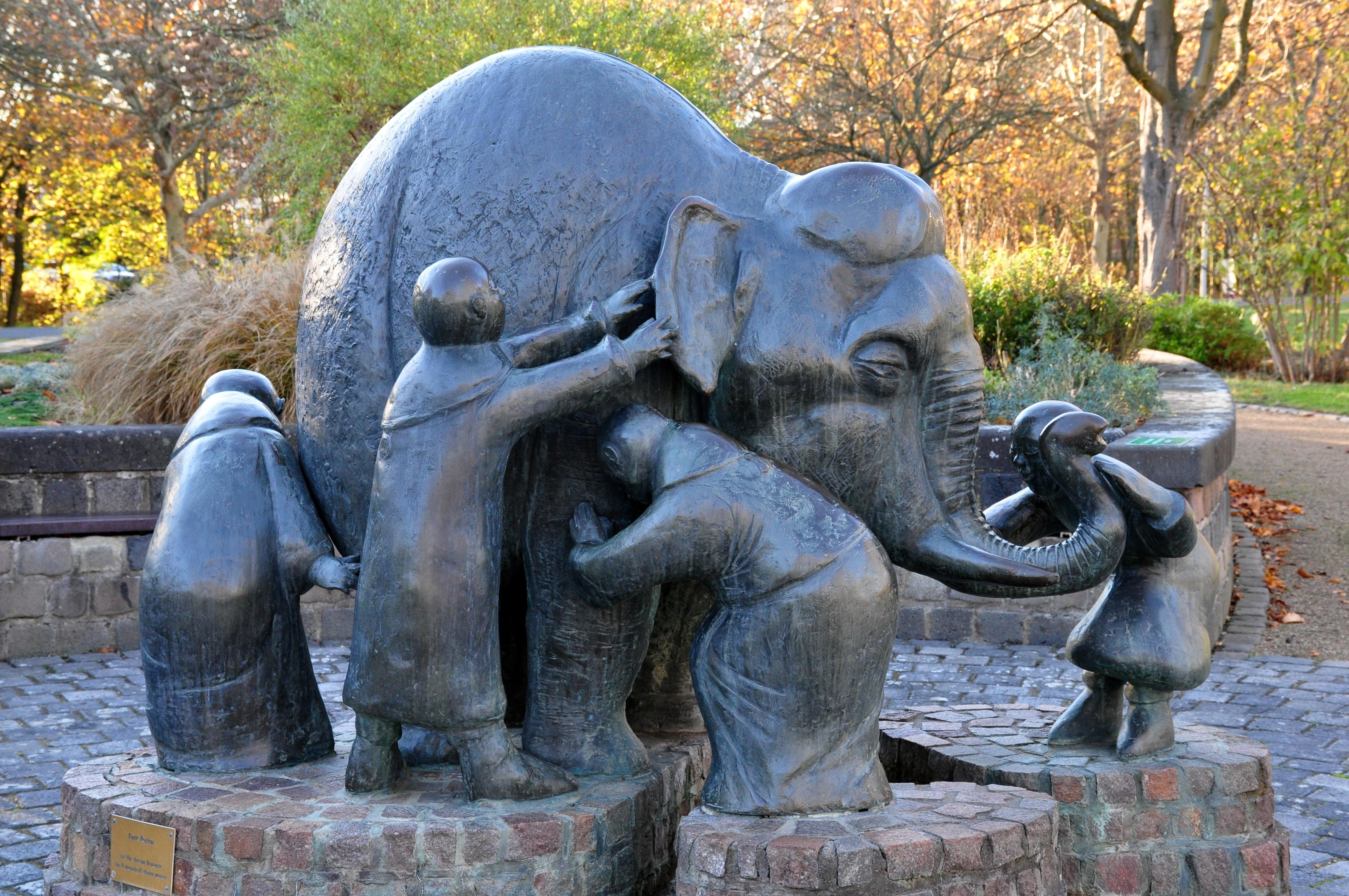 Blindenbrunnen von Horus Engels im Blindengarten – Rheinaue (Bonn)